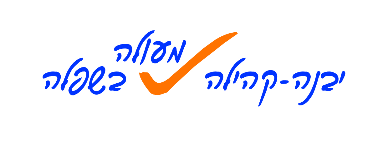 יבנה קהילה מעולה בשפלה